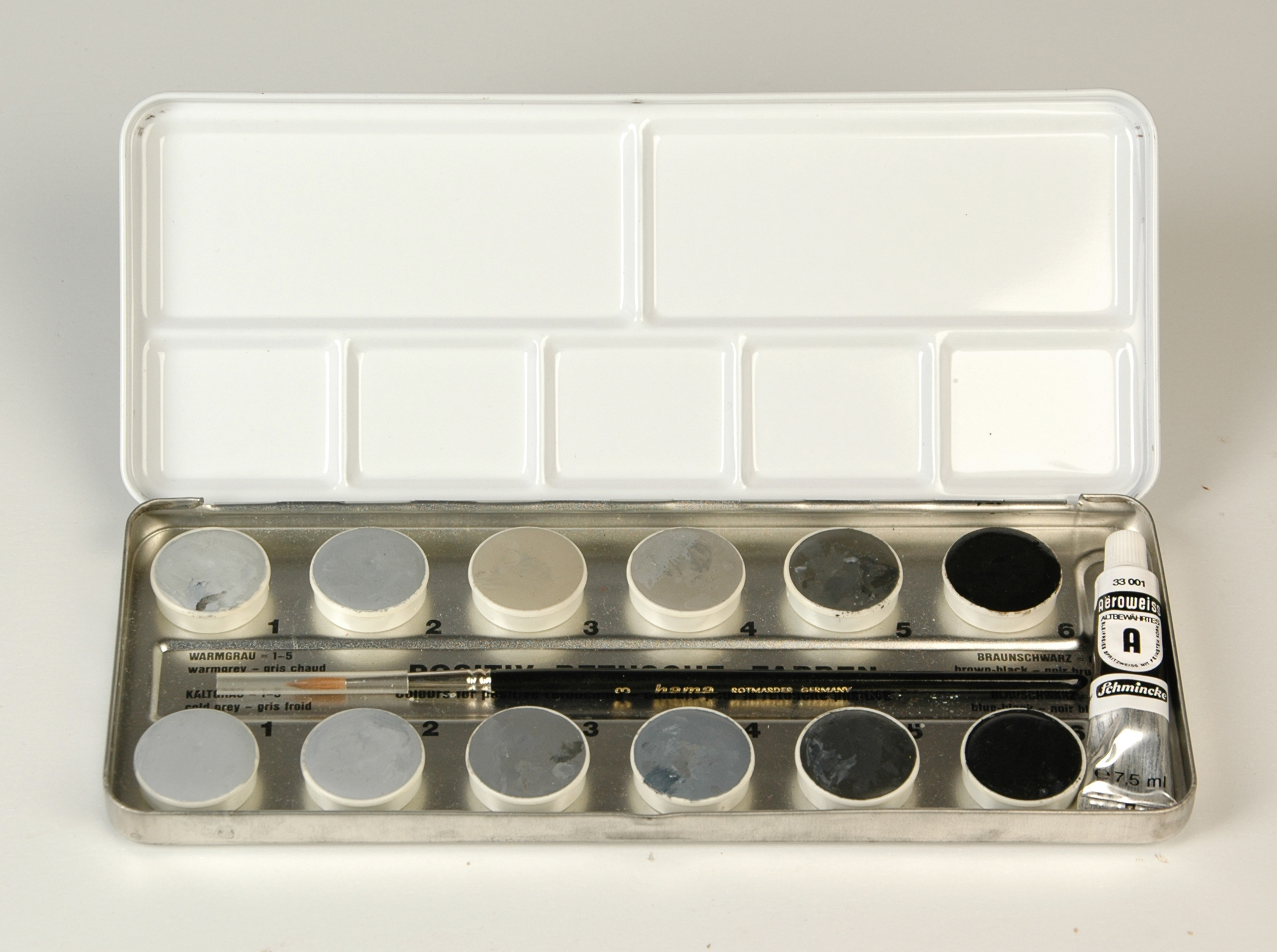 Retuschezubehör für analoge Fotografie. Im Kasten sind Pigmente in abgestuften Grauwerten Warmton Schwarz-Grau und Kaltton Schwarz-Grau, dazu Deckweiß.